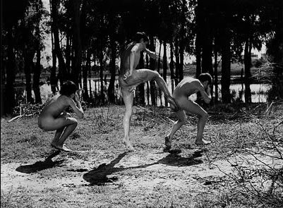 Foto de Crónica de un niño solo (1965), de Leonardo Favio. Argentina.